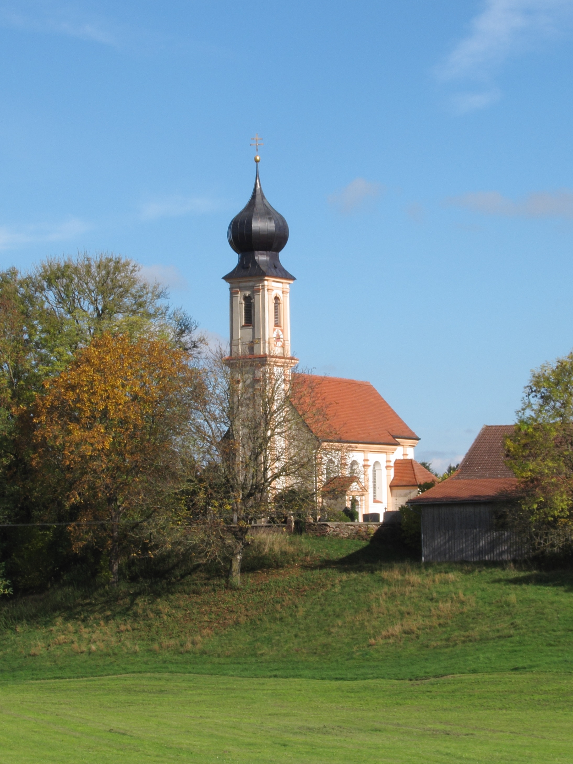 Katholische Filialkirche St. Petrus; Saalbau mit leicht eingezogener Apsis, angefügter Sakristei und Zwiebelturm, letztes Werk von Anton Kogler, erbaut 1729; mit Ausstattung; Friedhofsmauer aus Ziegelstein.